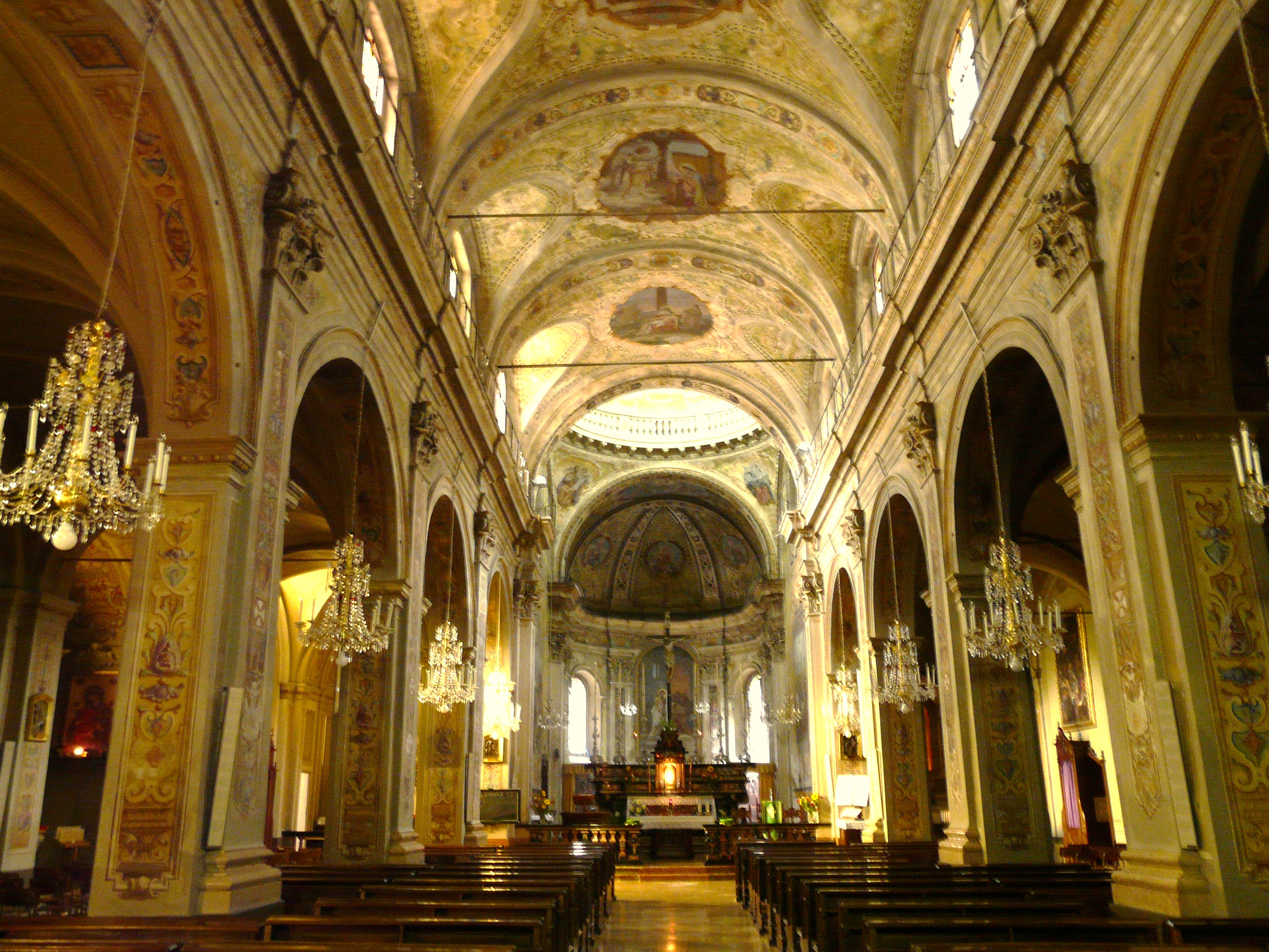 Chiesa di San Tommaso di Canelli, Piemonte, Italia